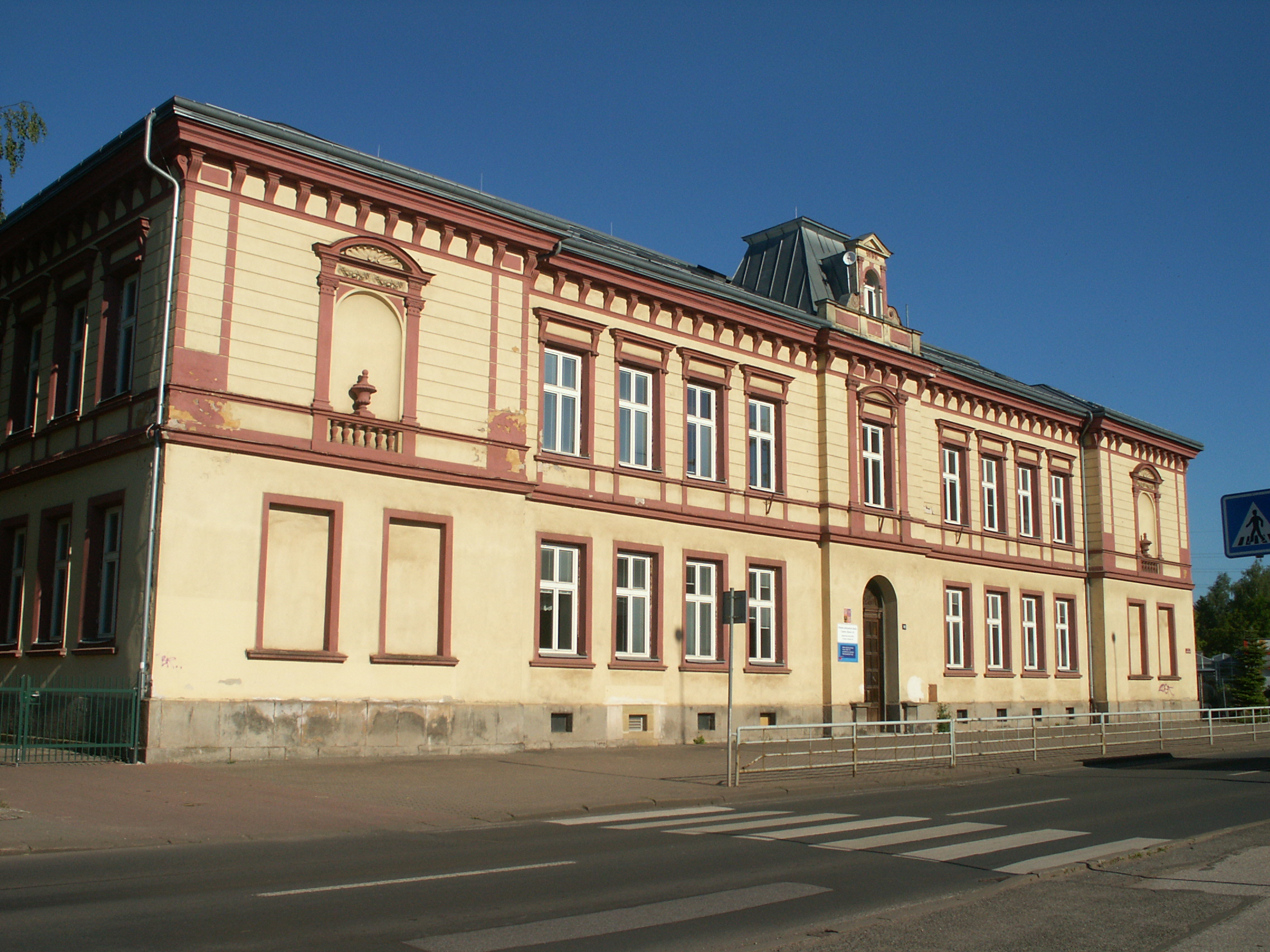 Střední škola, Horská 59, Dolní Staré Město.